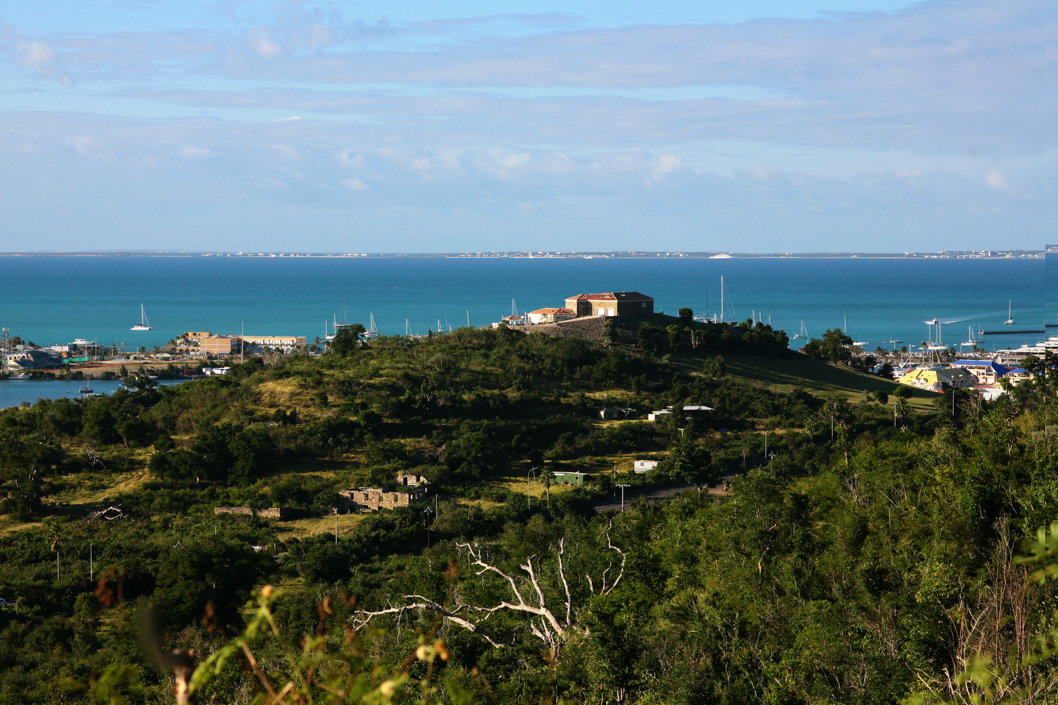 Marigot depuis Bellevue